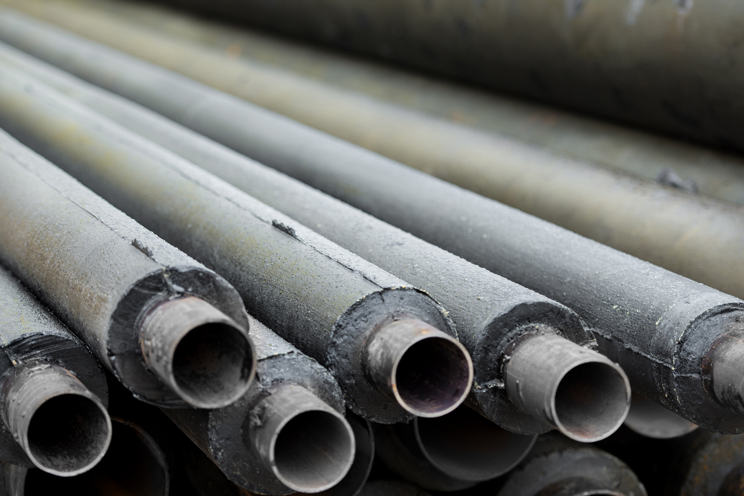 ППМ изоляция на стальных струбопроводах. ППМ изоляция черного цвета со специальной присадкой для защиты от УФ-излучения.